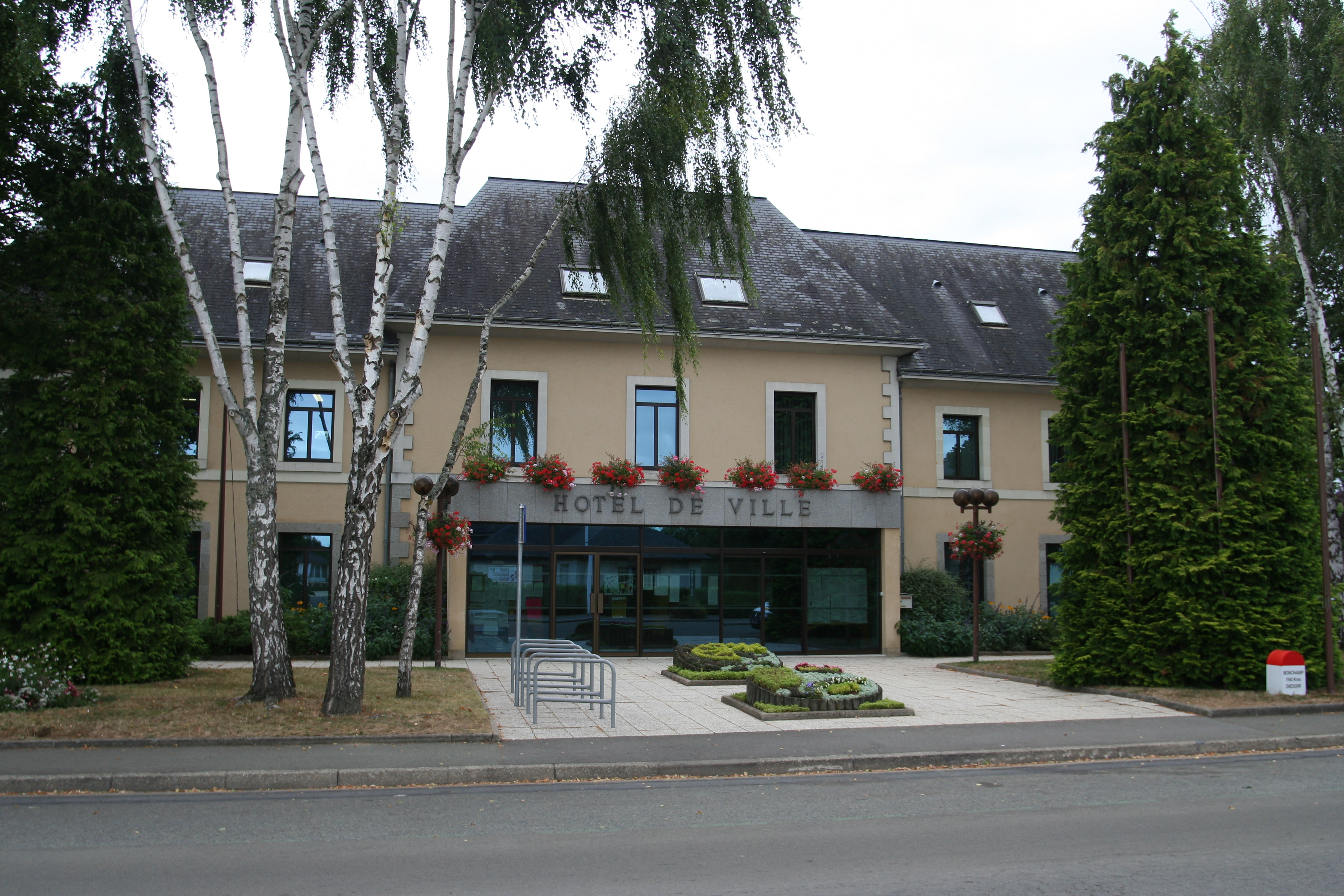 Mairie de Bonchamp-lès-Laval.